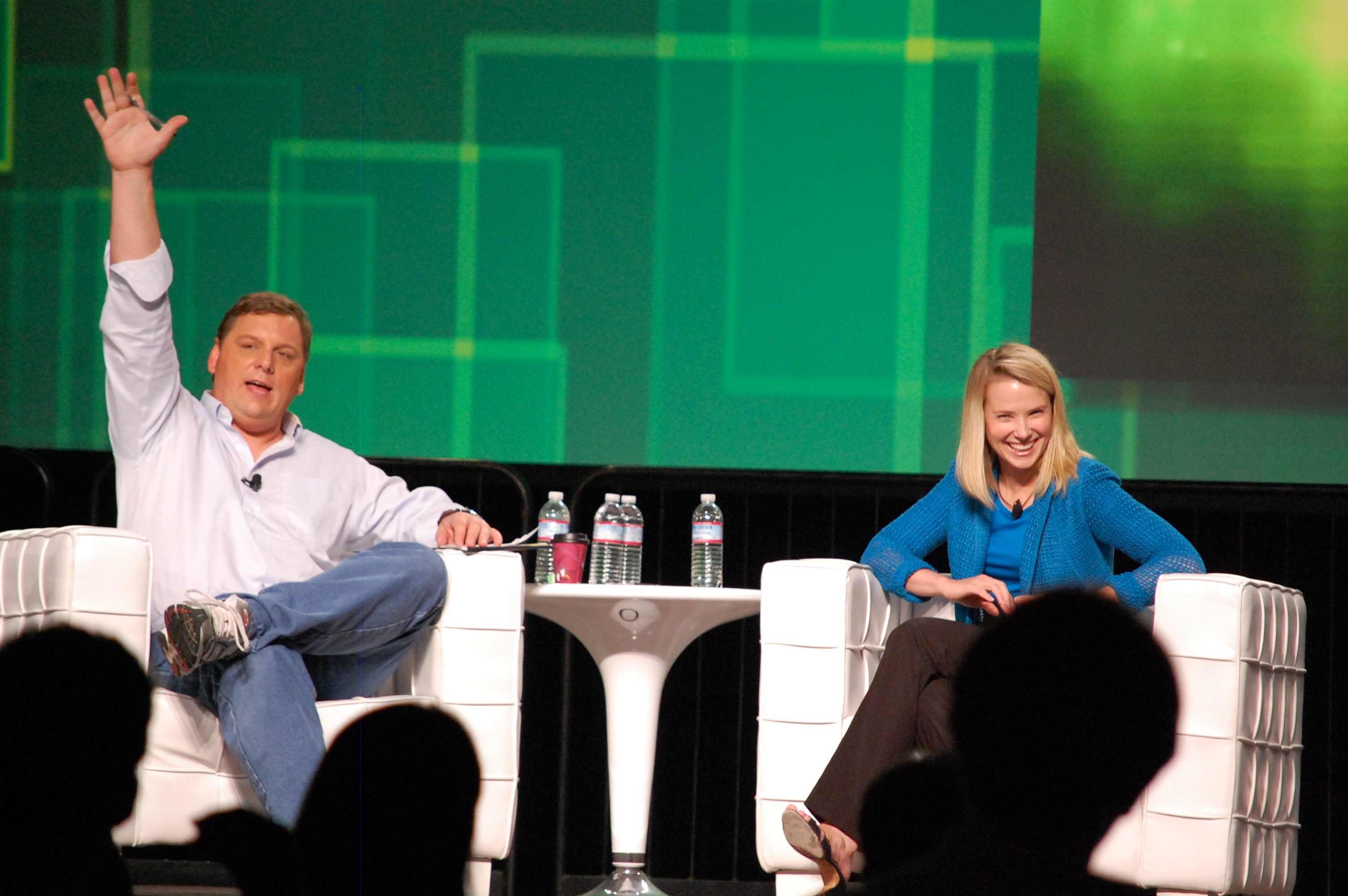 Michael Arrington, Marissa Mayer, TechCrunch Disrupt 2011.